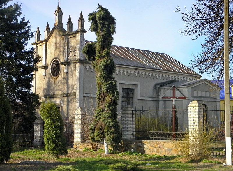 Неоготичний костел-каплиця, що зберігся від палацу Петра Мошинського. Останній було закладено над ставом р. Дохни у 1819 році. Архітектор Любовидзький